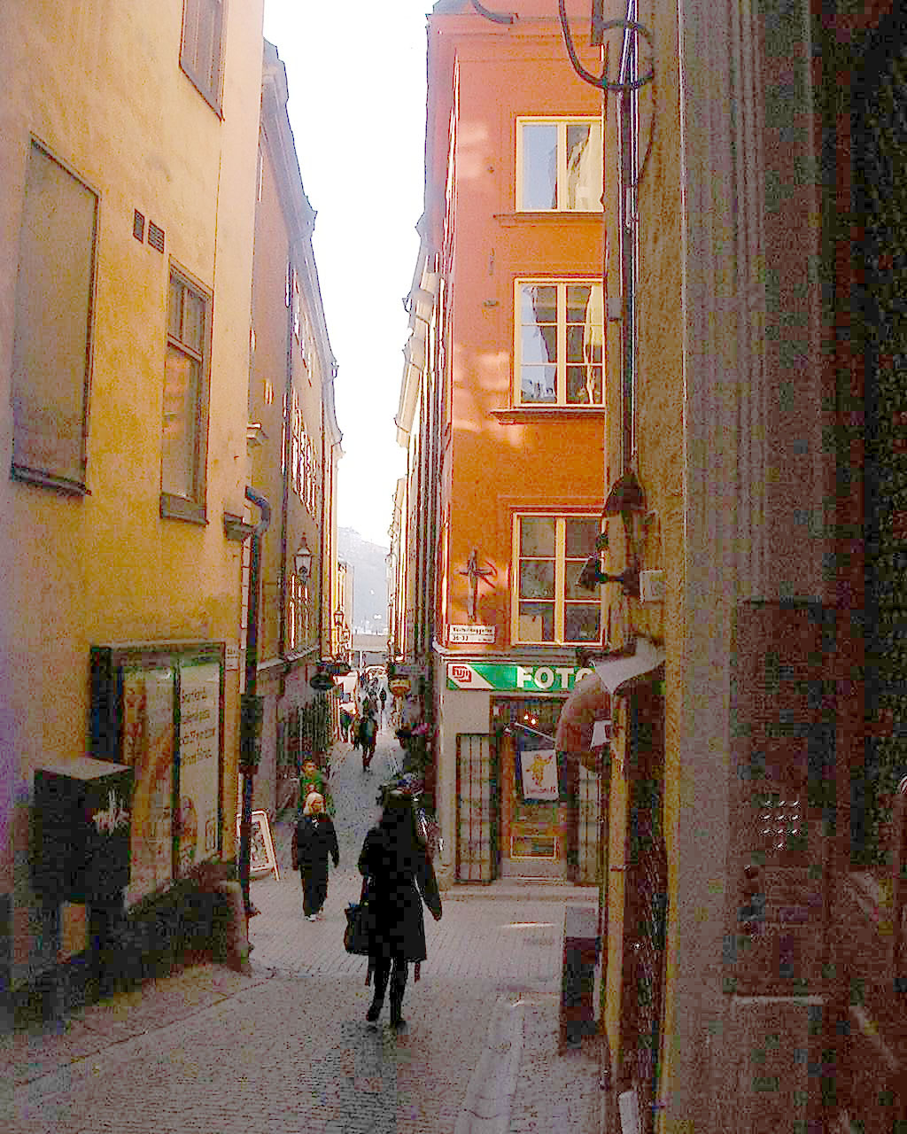 Kåkbrinken, Gamla stan, Stockholm. Light modified.